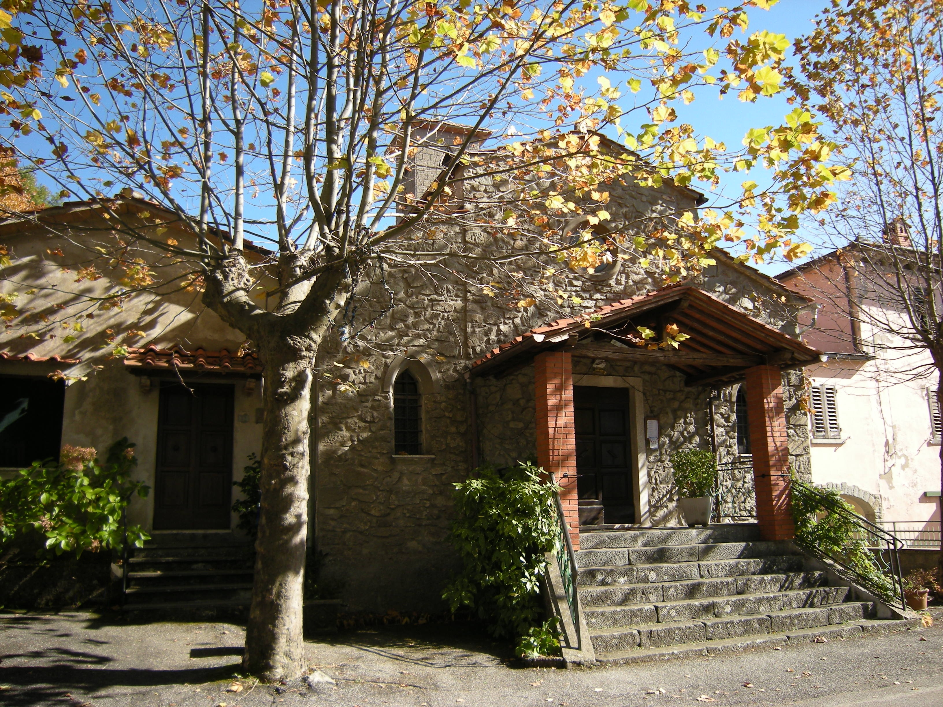 Chiesa nella frazione di Prataccio, comune di Piteglio